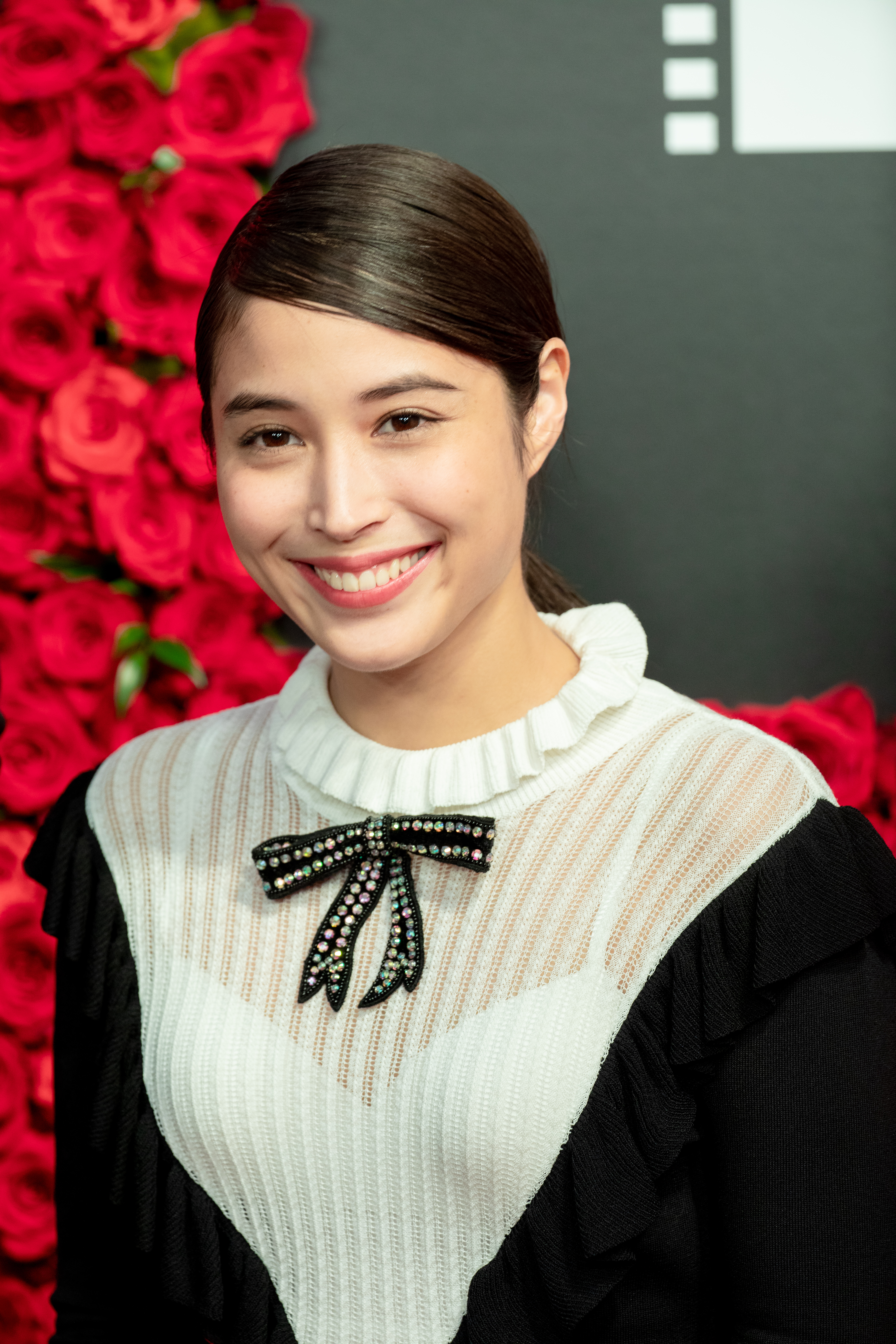 第30回 東京国際映画祭 オープニングセレモニー 広瀬アリス (旅猫リポート)